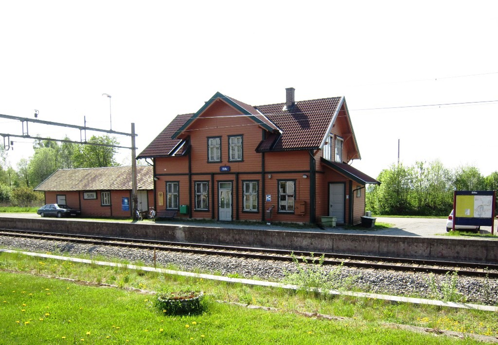 Slitu stasjon på Østfoldbanens østre linje